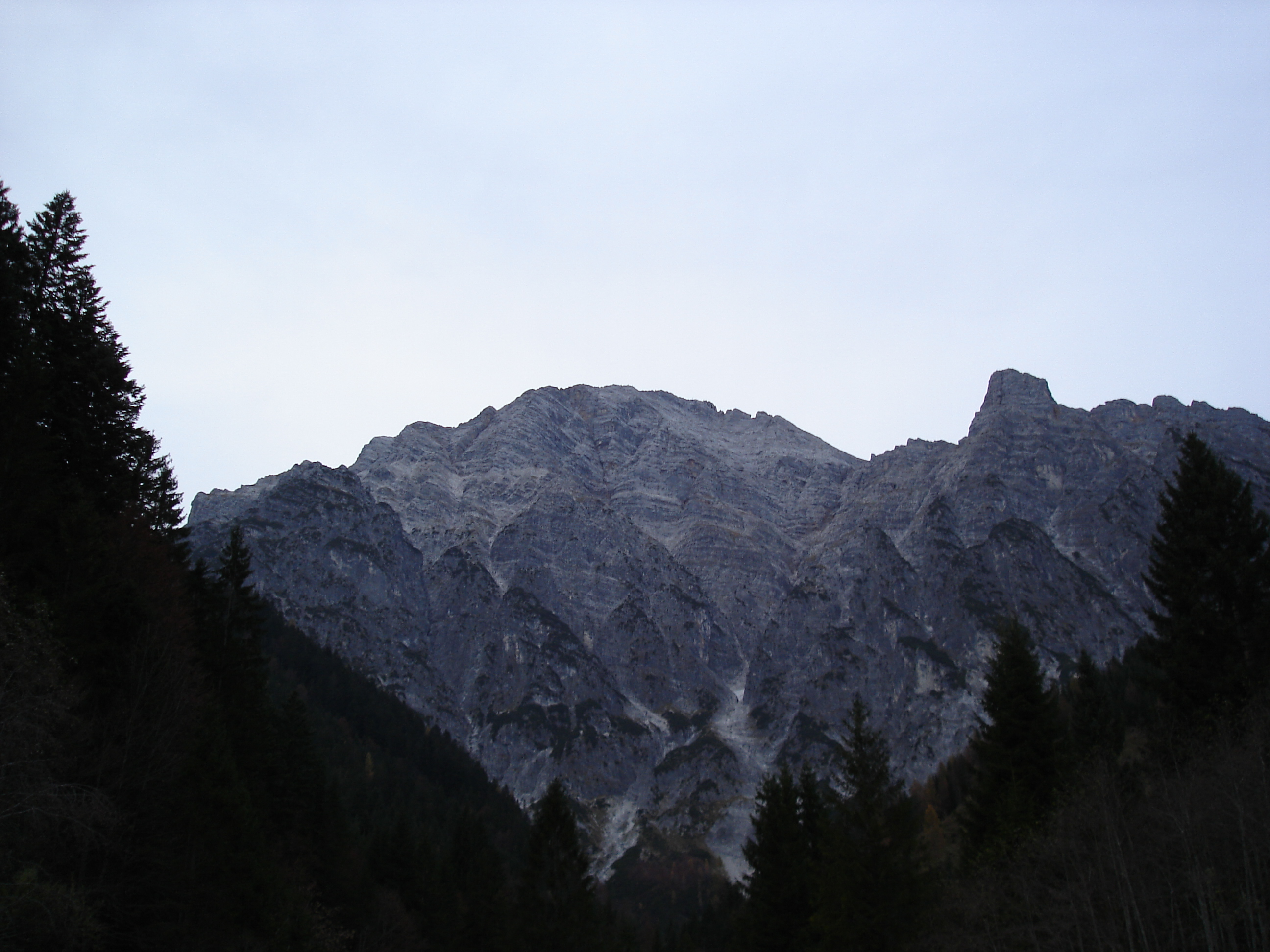 Birnhorn Südostwand, Leoganger Steinberge, Österreich